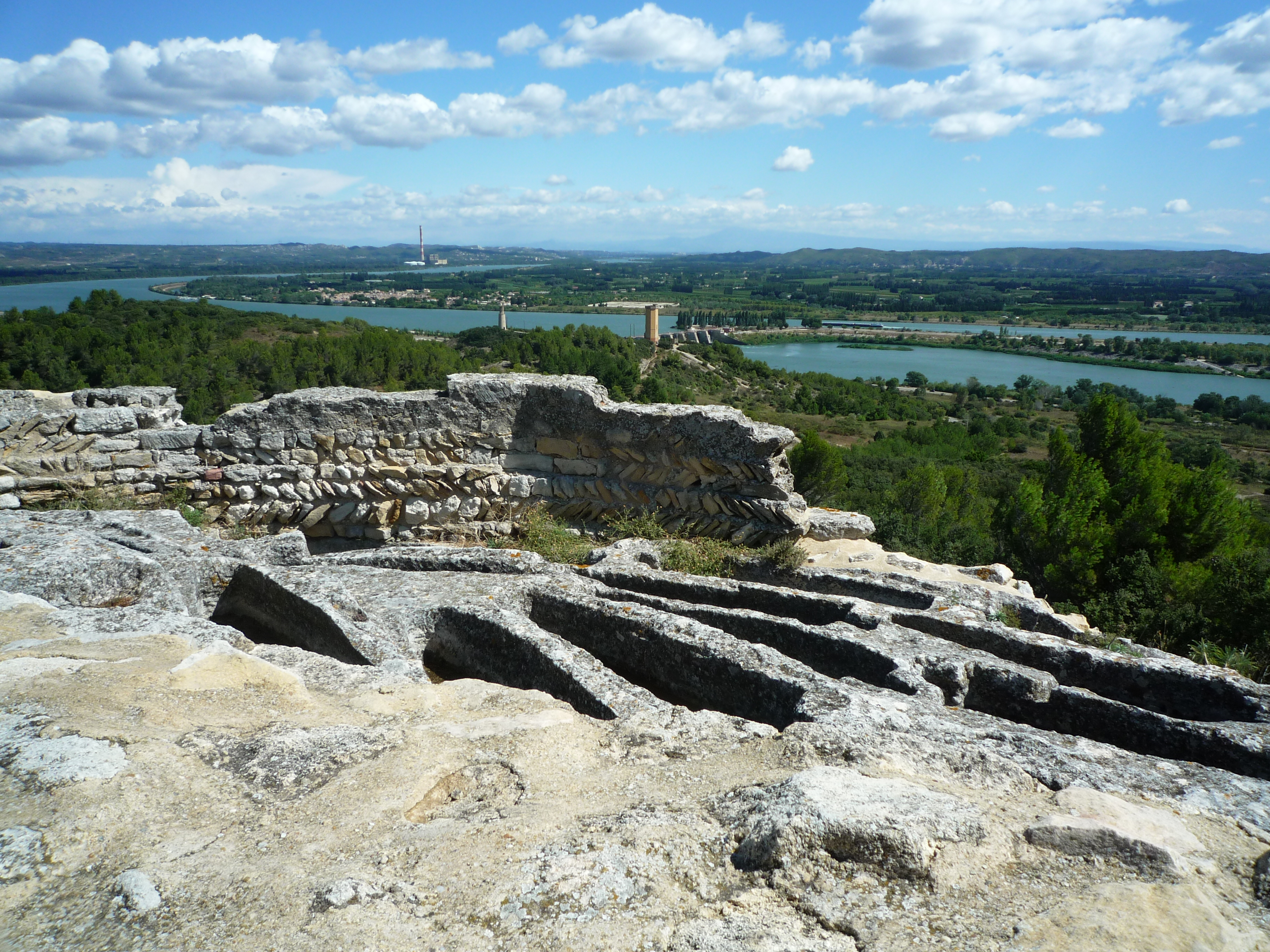 Abbaye de Saint-Roman, einzigartiges Monument im Herzen der ProvenceAuf eienm Hügel in der Nähe